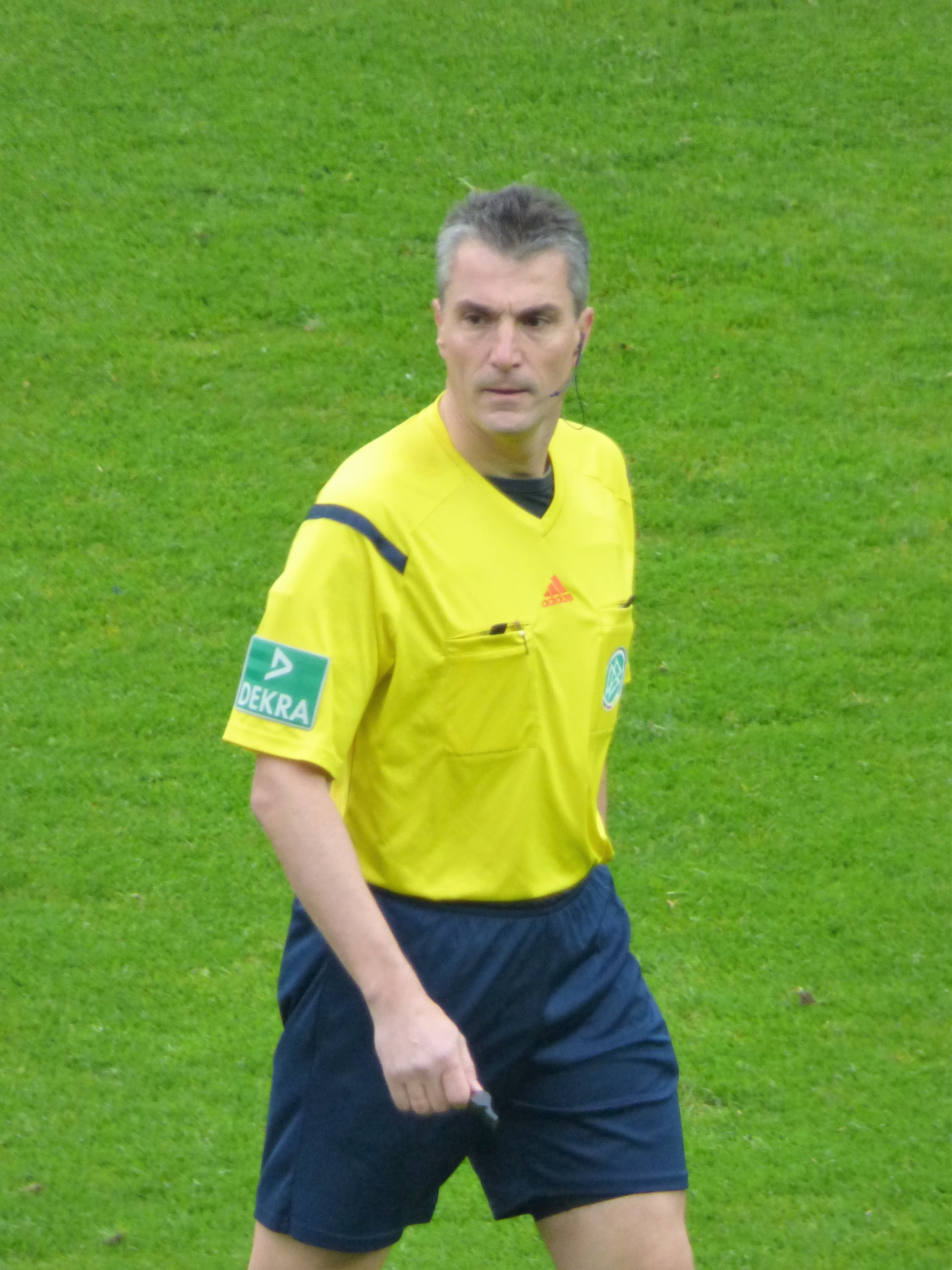 Kircher, Knut Schiri